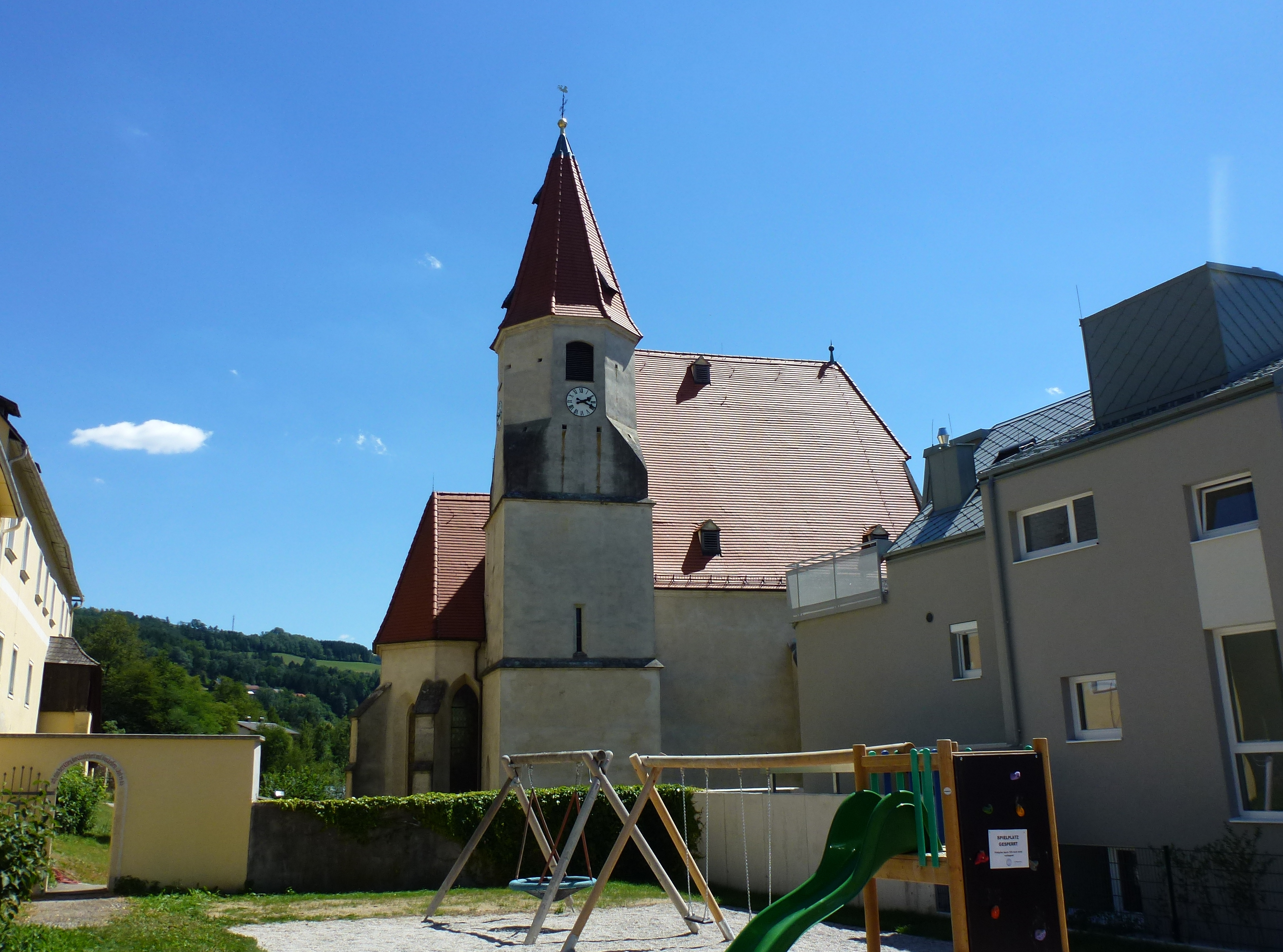 Kath. Pfarrkirche hl. Vitus